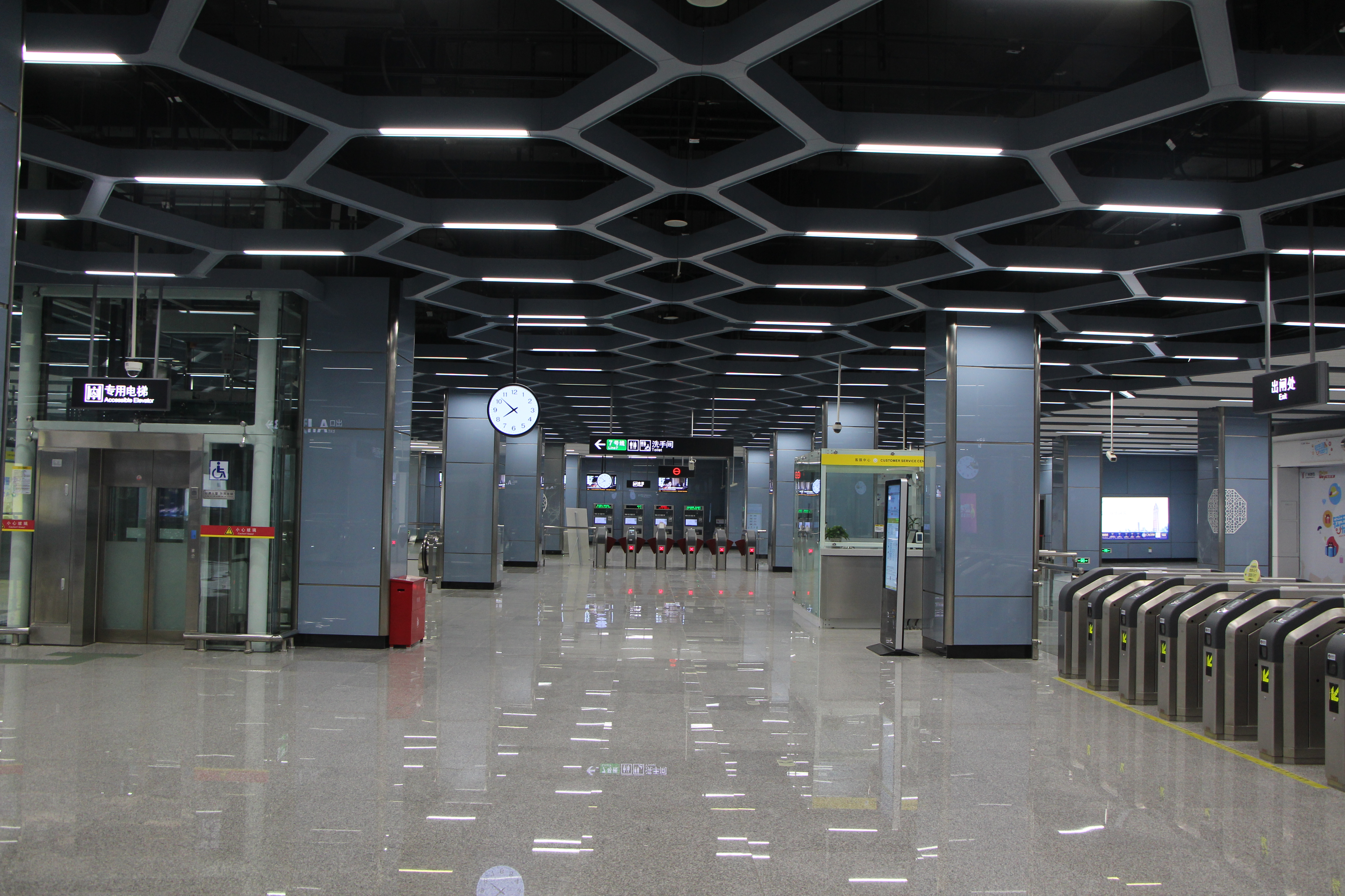 广州地铁南村万博站